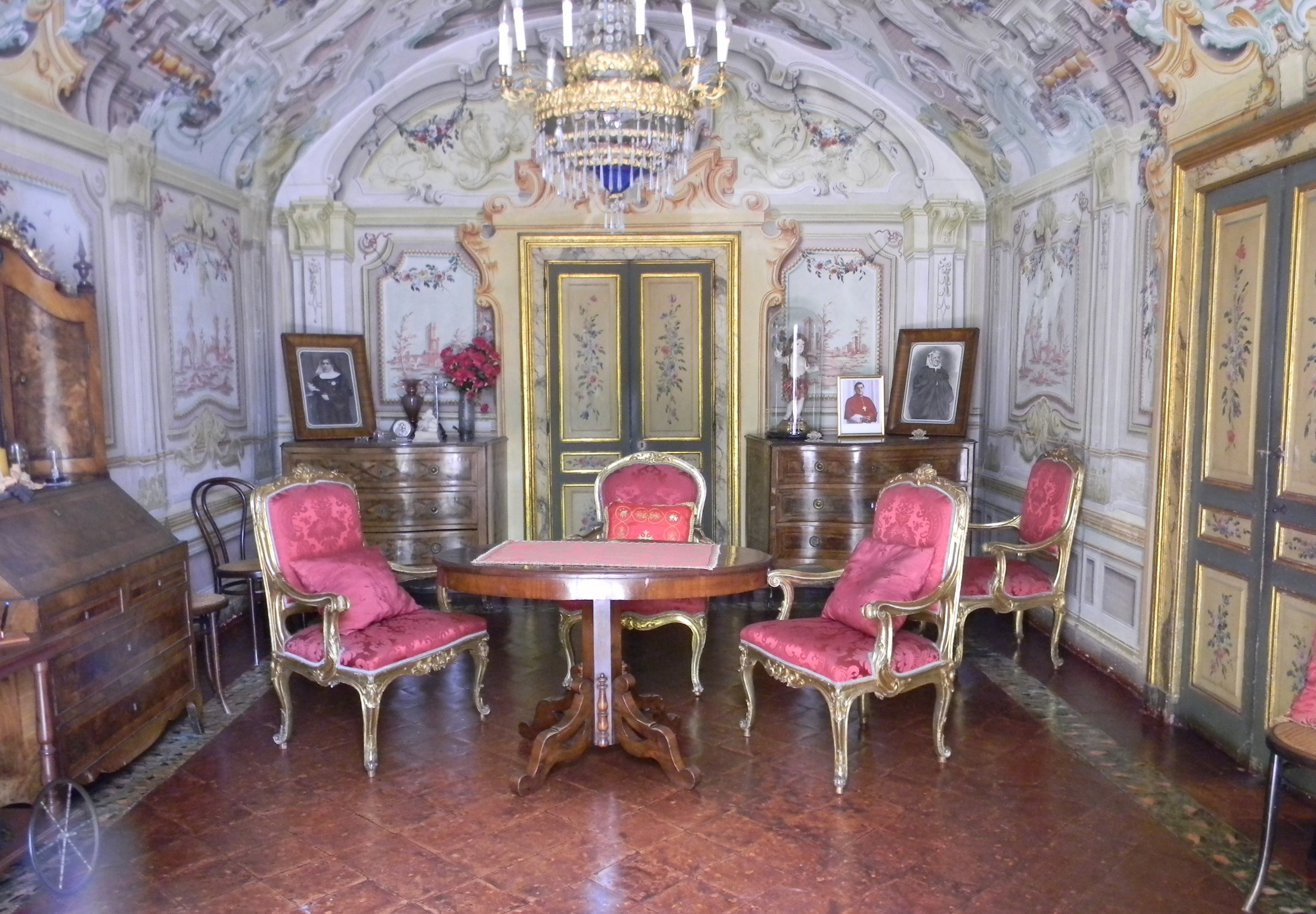 Sala della badessa - Monastero di San Gregorio Armeno di Napoli